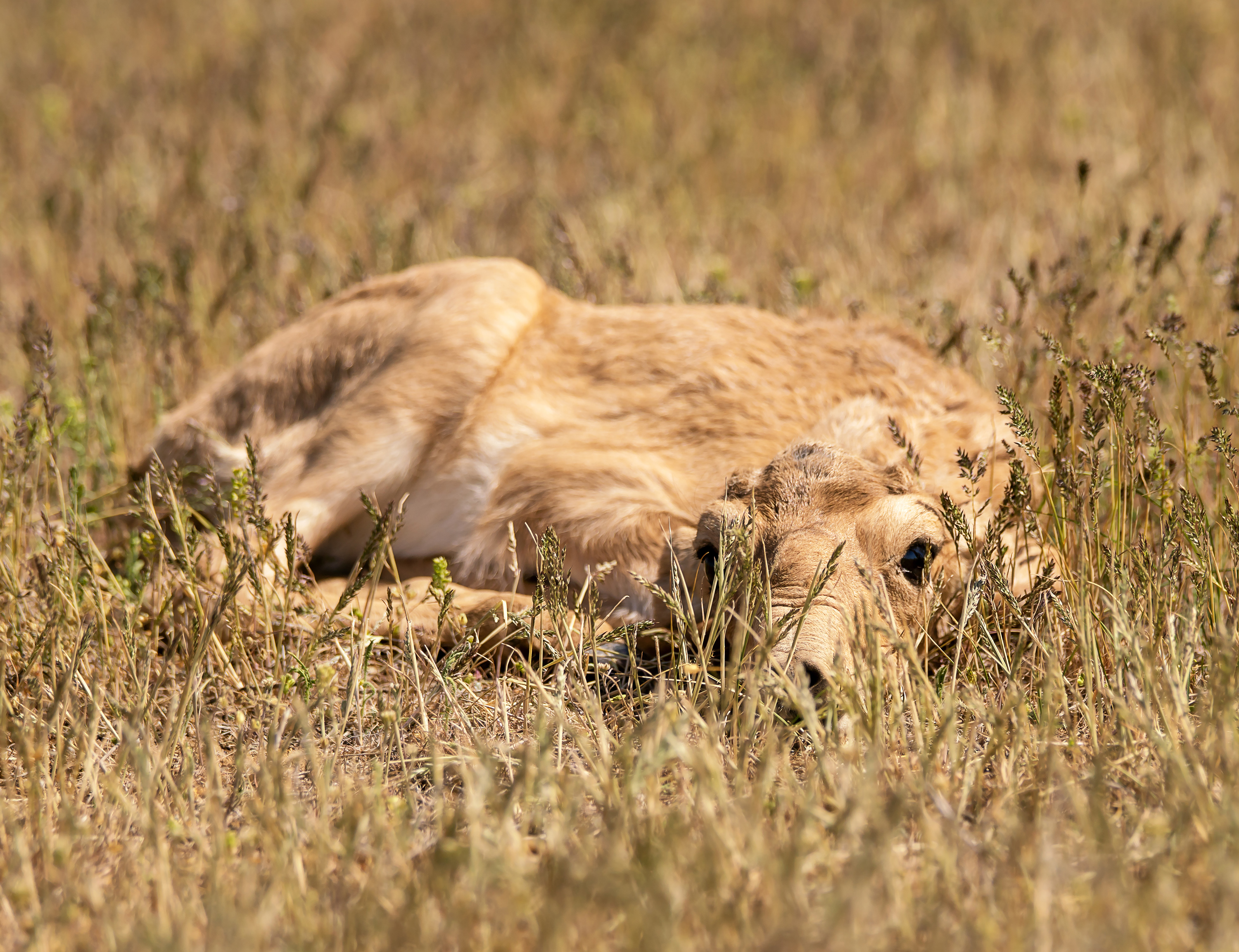 Чёрные земли: Основной участок заповедника расположен на Прикаспийской низменности, между низовьями рр. Кума и Волга, на территории Яшкульского и Черноземельского районов Республики Калмыкия. Почти весь он находится ниже уровня моря. Участок "Озеро Маныч Гудило" находится в центральной части Кума-Манычской впадины, на берегах одноименного озера, в Яшалтинском и Приютненском районах Республики Калмыкия, в непосредственной близости от Ростовского заповедника, Черноземельский район, Калмыкия This image is related to the protected area of Russia number 0800027